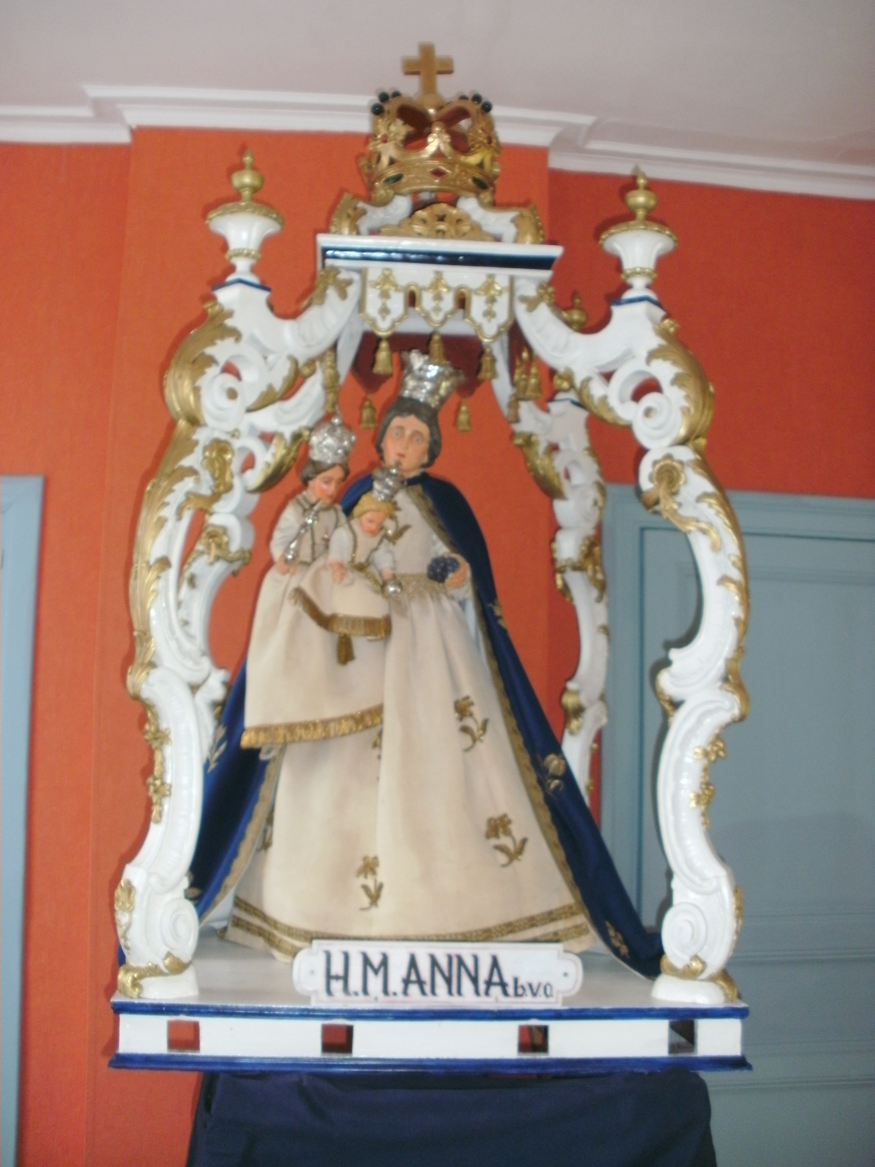 Tijdens de Sint-Anna-ommegang in Bambrugge wordt het Sint-Annabeeld op een draagstoel gedragen.